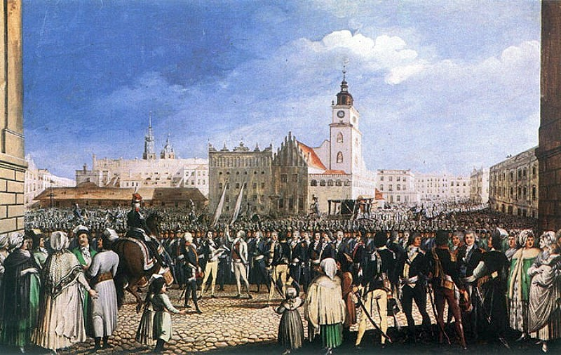 Przysięga T. Kościuszki na rynku w Krakowie - gwasz z 1804 roku.title QS:P1476,pl:"Przysięga T. Kościuszki na rynku w Krakowie - gwasz z 1804 roku." label QS:Lpl,"Przysięga T. Kościuszki na rynku w Krakowie - gwasz z 1804 roku." label QS:Lde,"Eid des Generals Kosciuszko am 24. März 1794 auf dem Marktplatz von Krakau"